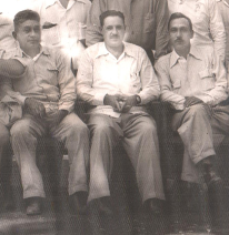 Fotografiado en la visita con los dirigentes del Ingenio San Francisco